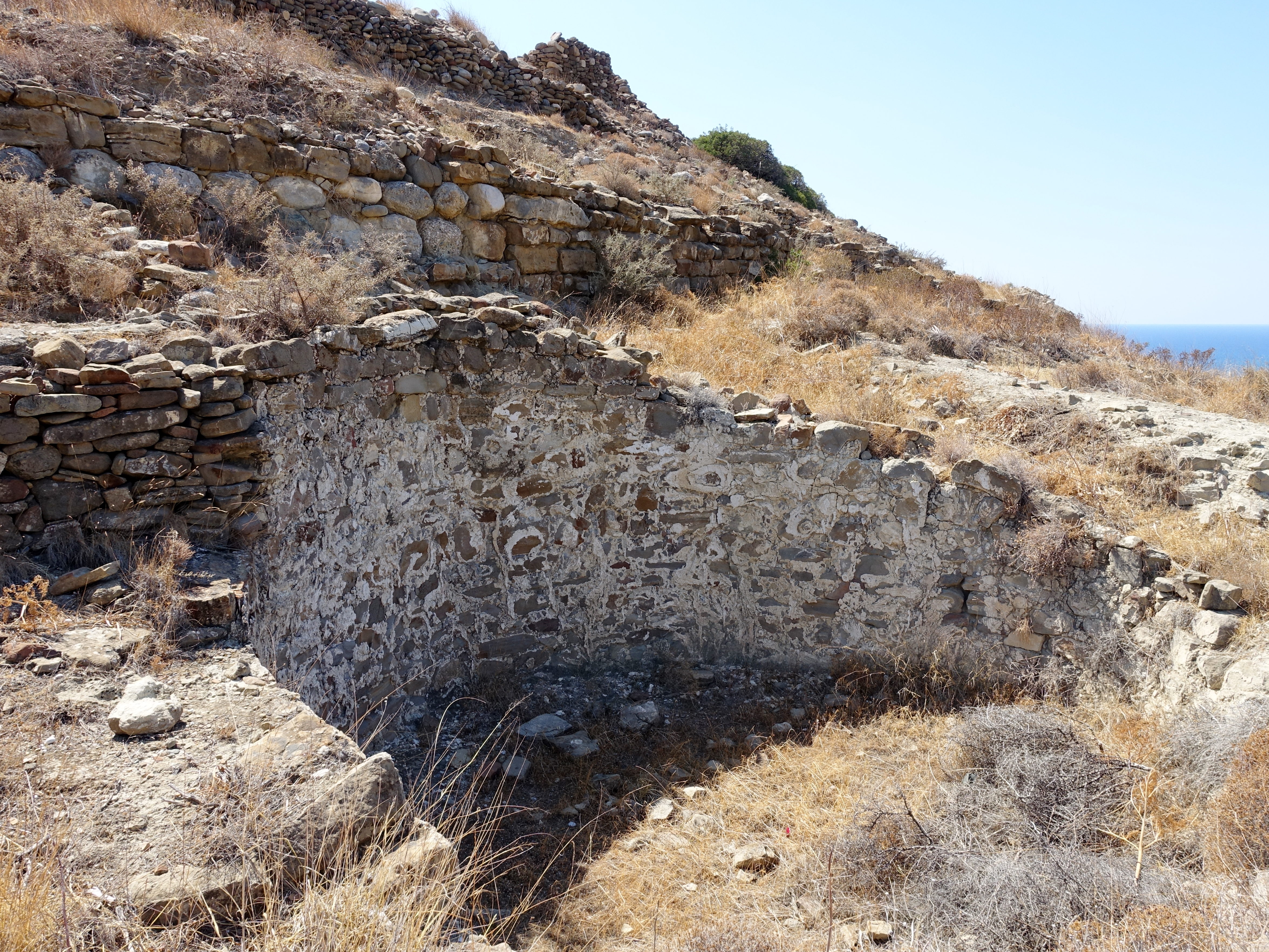 Zisterne der Ausgrabungsstätte von Pyrgos bei Myrtos, Kreta, Griechenland